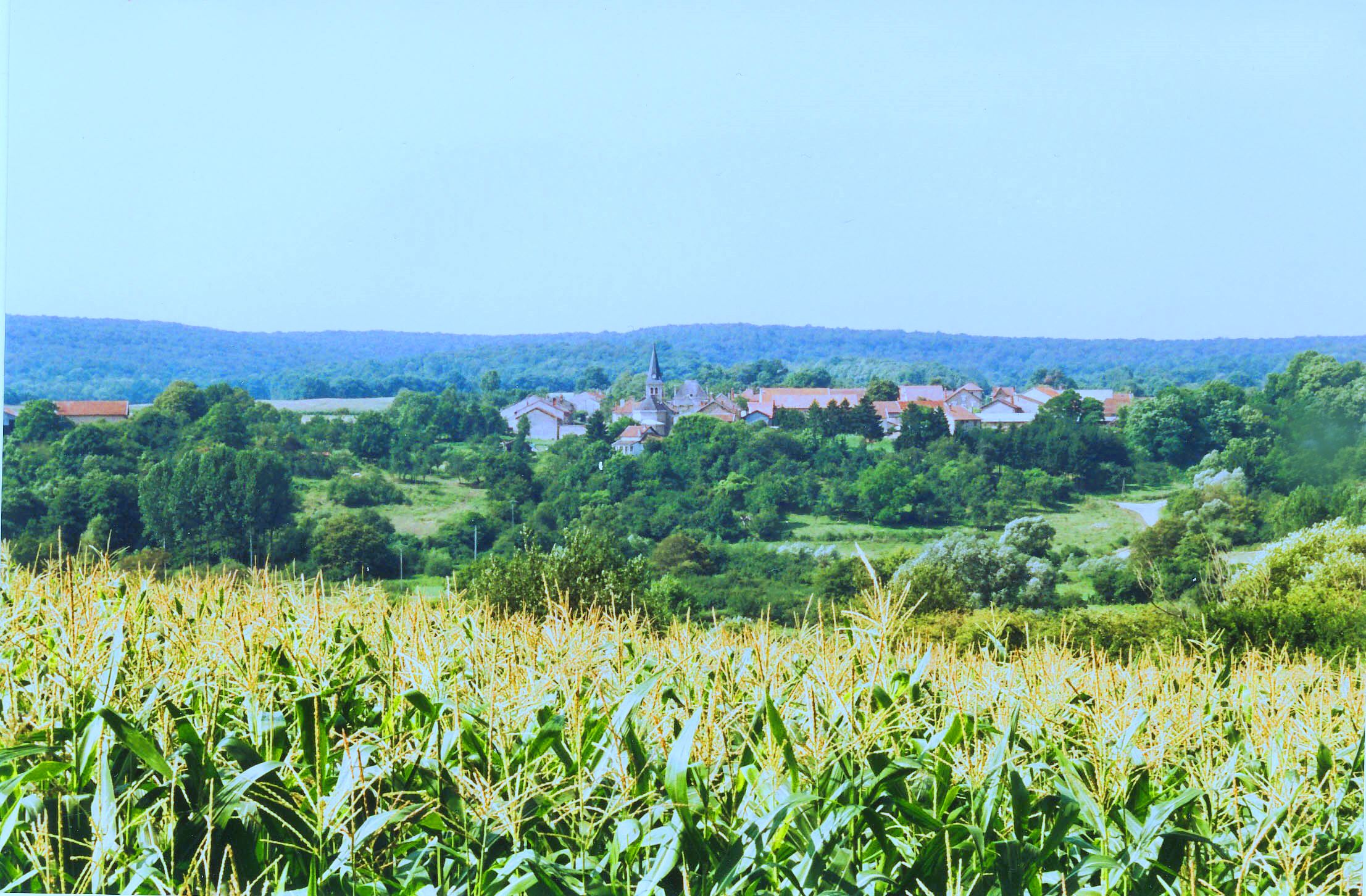 Montblainville - vue générale